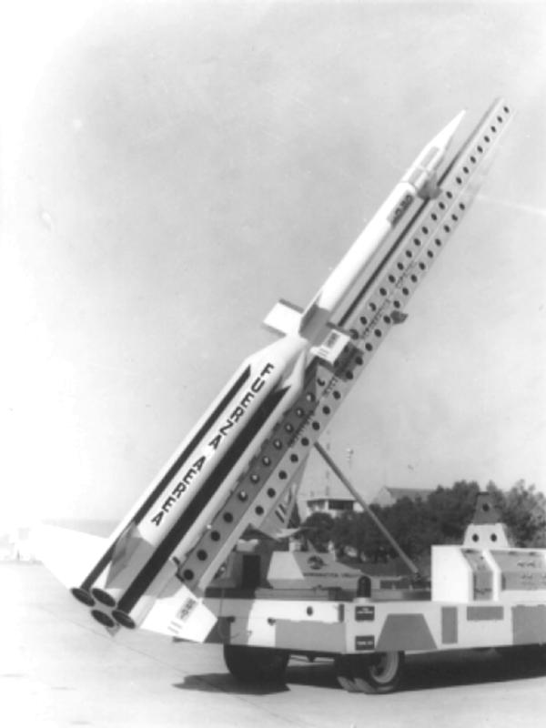 Primer lanzamiento del Castor (CRX-01) en CELPA Chamical.